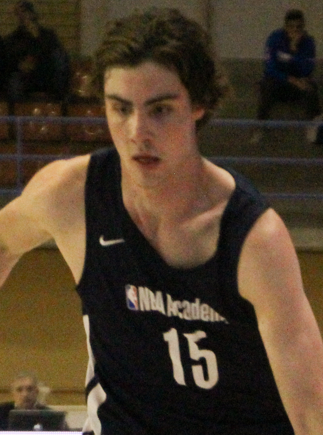 Joventut de Badalona - NBA Academy